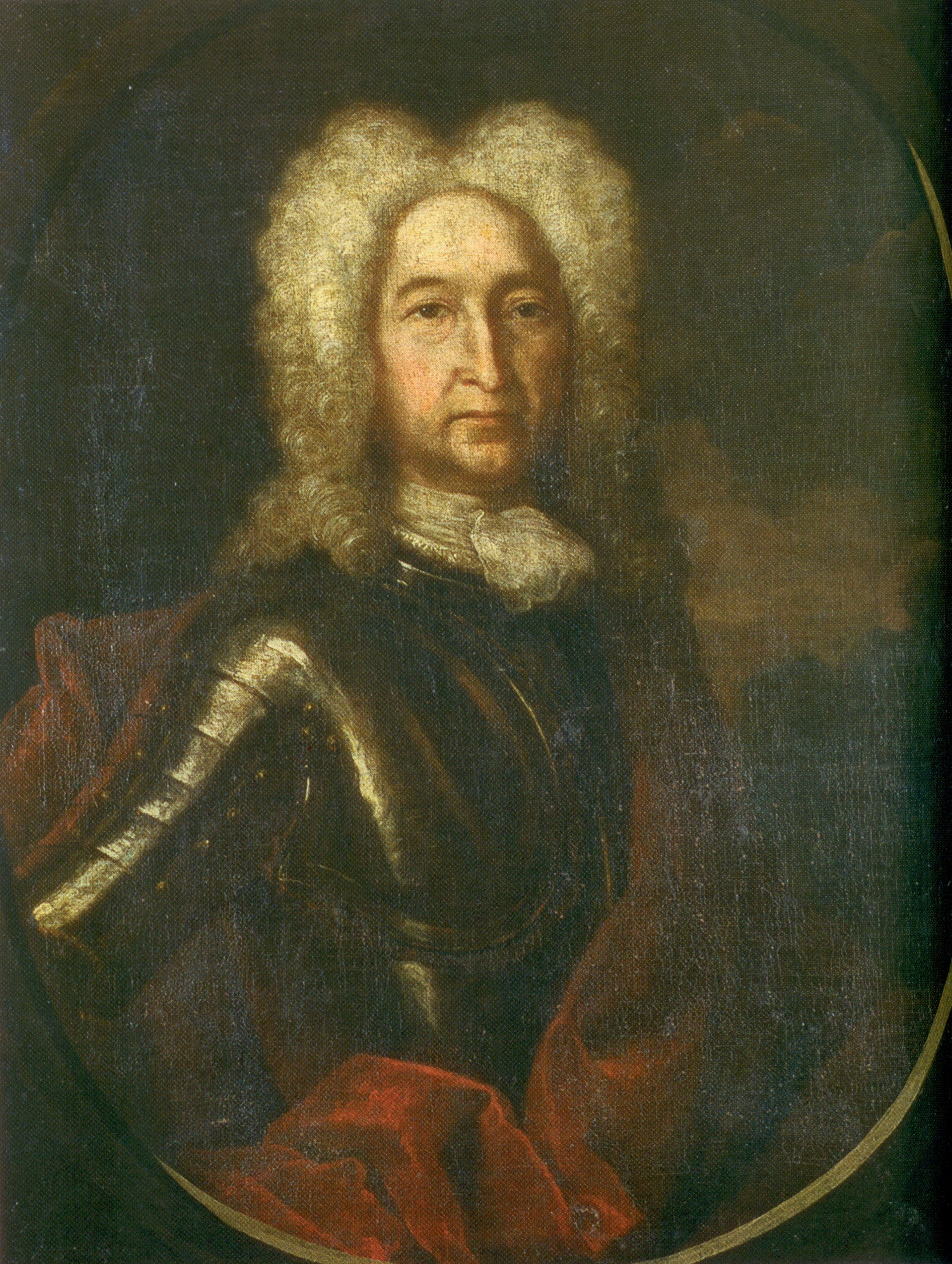 Иван Алексеевич Голицын (1658-1729)